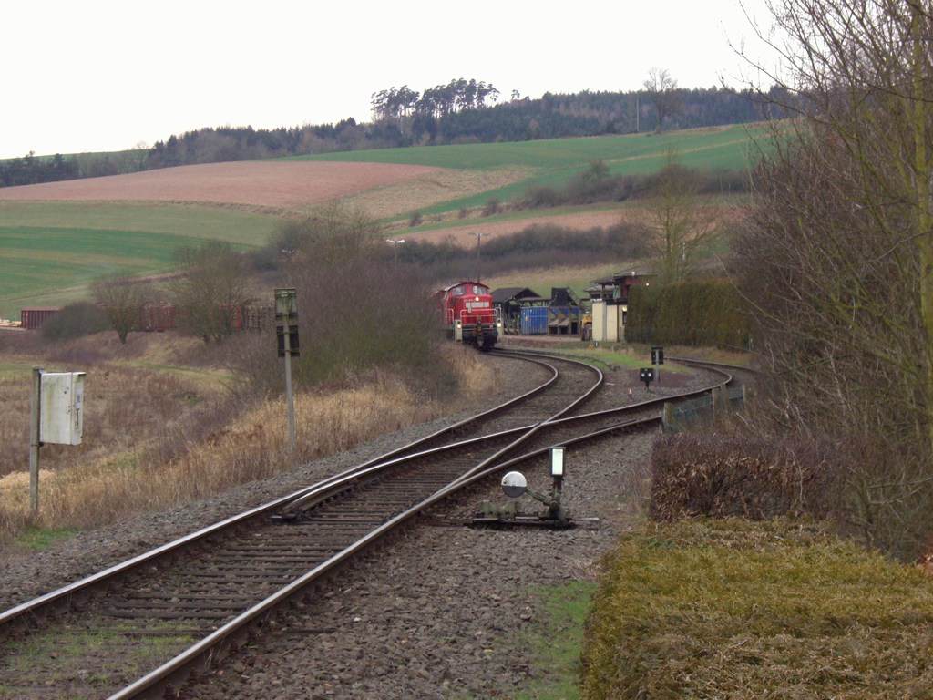 Güterzug beim Streckenende der Bahnstrecke Bad Hersfeld-Breitenbach (Standort: Breitenbach am Herzberg)